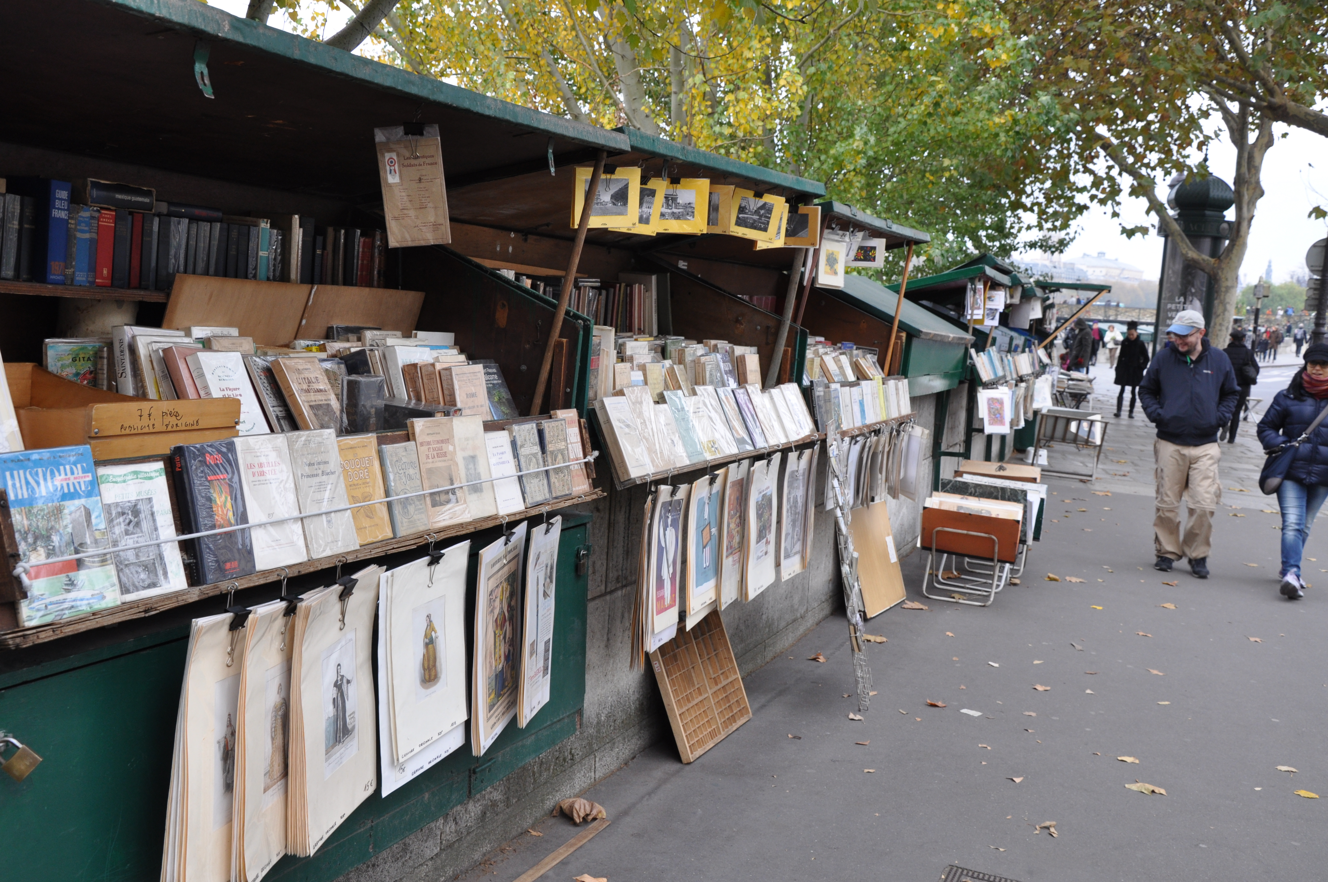 Bouquiniste sur les quais de la Seine (Paris, 2012)